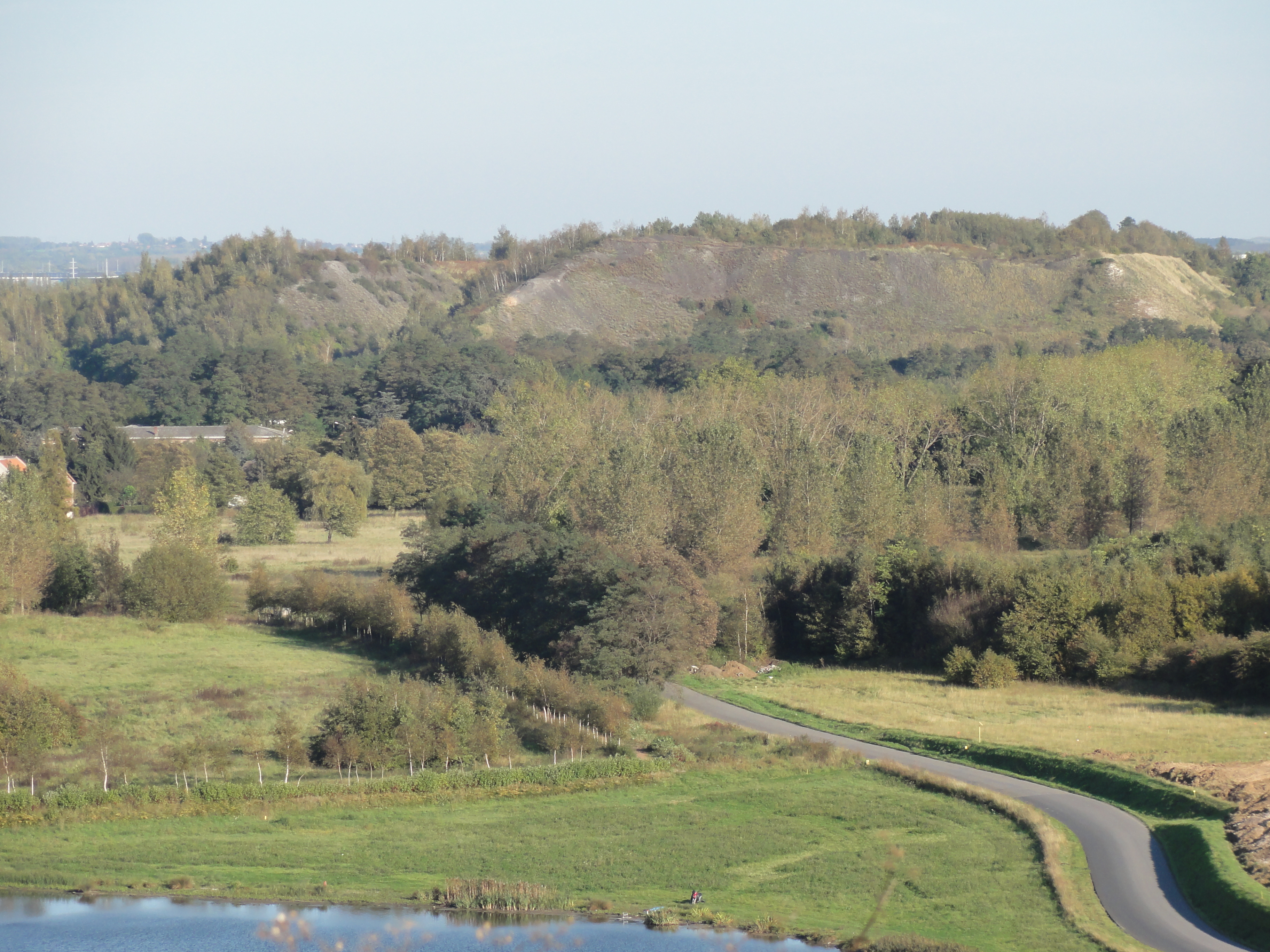 Terrils nos 83, 100 et 230 dits 7 - 19 Marais, Décharge Marais de Fouquières et Remblais Marais de Fouquières, Fosse n° 7 - 19 de la Compagnie des mines de Courrières, Fouquières-lez-Lens, Pas-de-Calais, Nord-Pas-de-Calais, France.